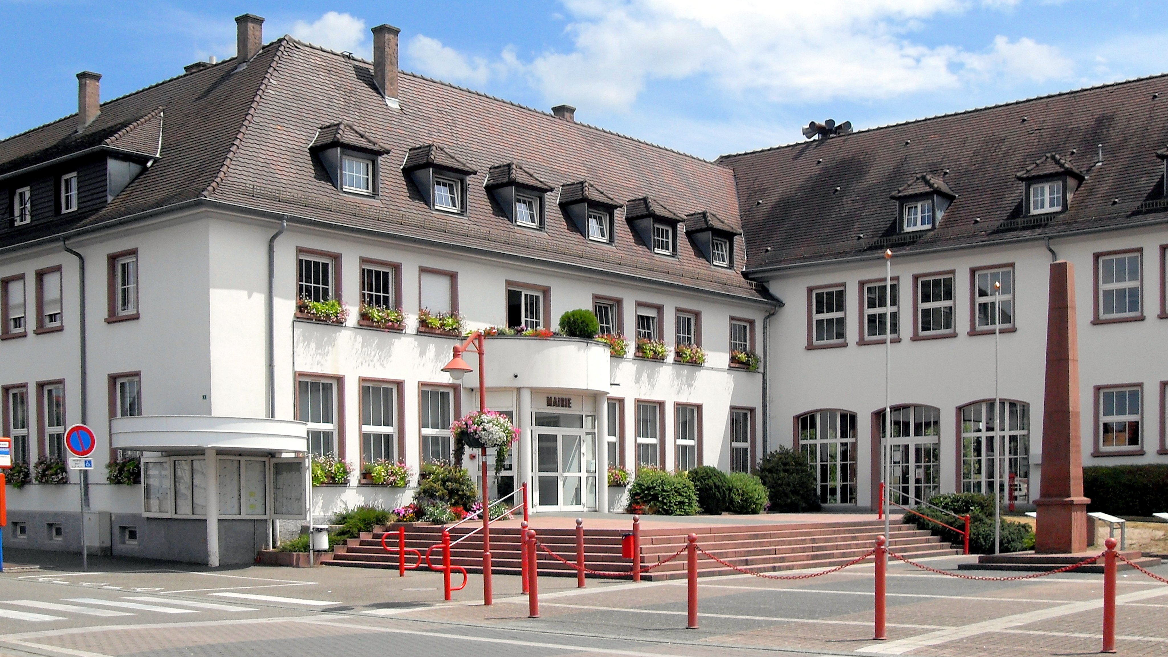 La mairie d'Oberhoffen-sur-Moder